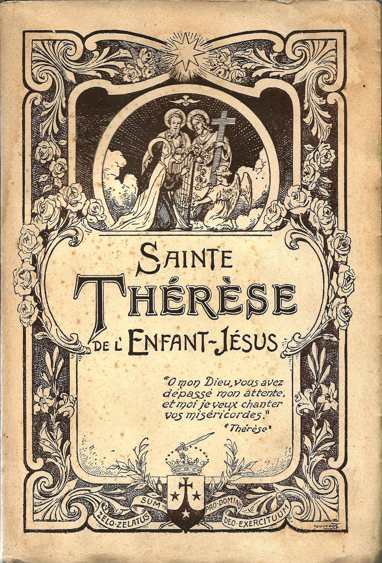 Couverture de Sainte Thérèse de l'Enfant Jésus, Histoire d'une âme écrite par elle-même, Lisieux, Office central de Lisieux (Calvados), & Bar-le-Duc, Imprimerie Saint-Paul, 1937, édition 1940